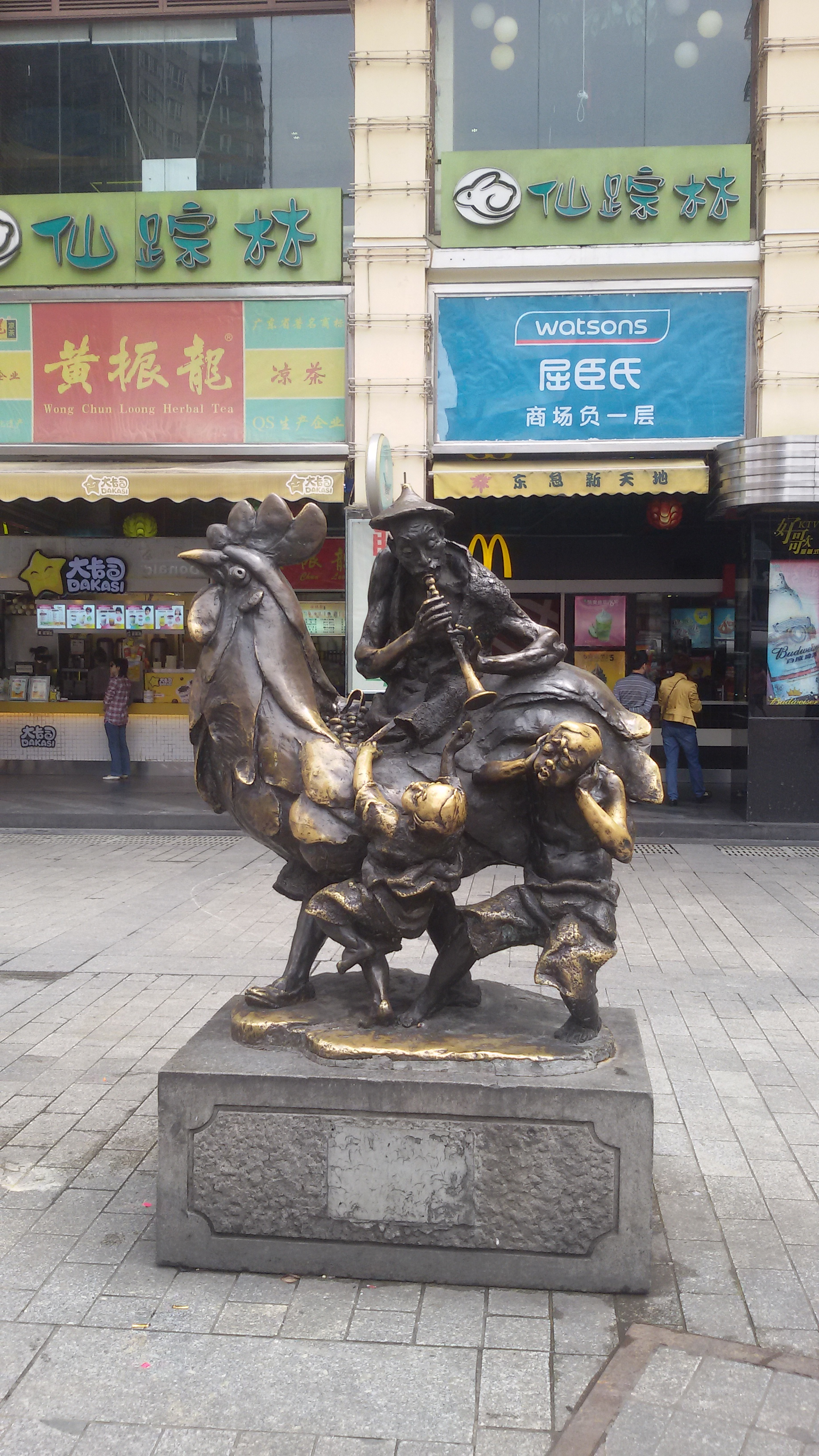 粵語: 鷄公欖